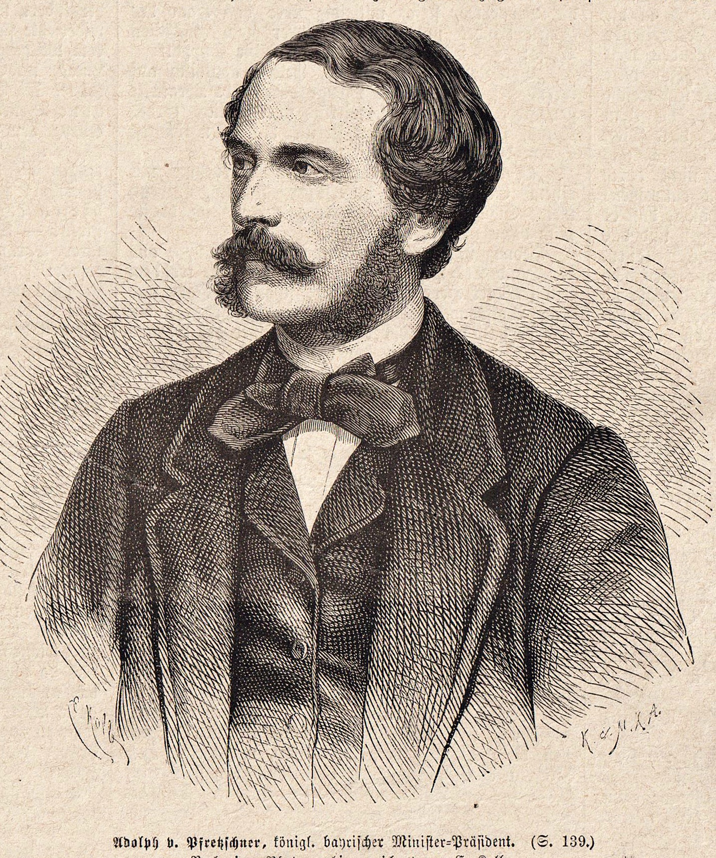 Adolph von Pfretzschner (+ 1901), Bayerischer Ministerpräsident